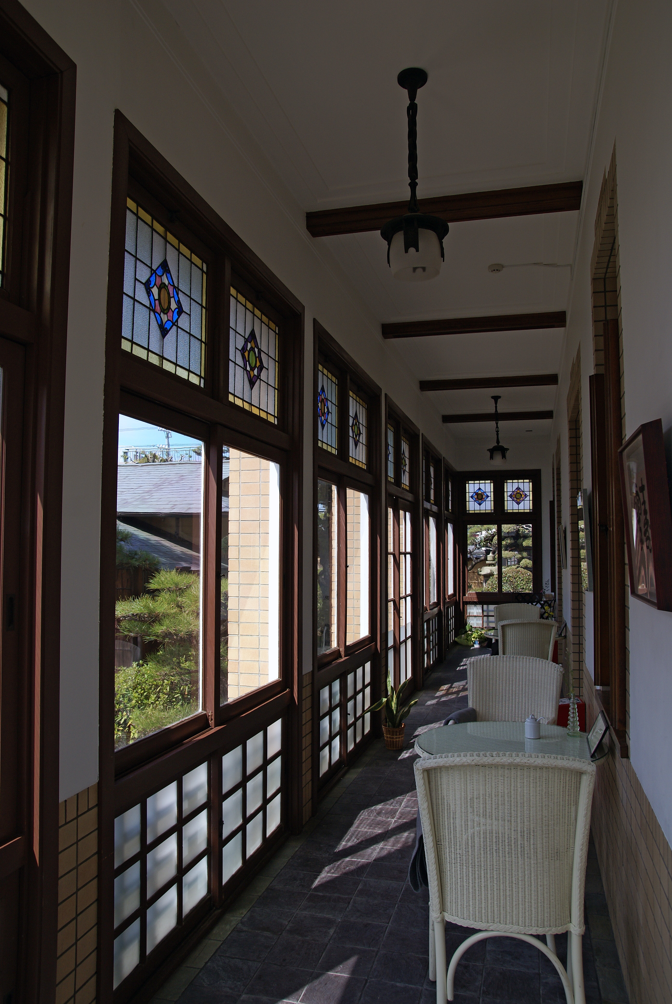 Tajiri Historic House in Tajiri, Osaka, Japan